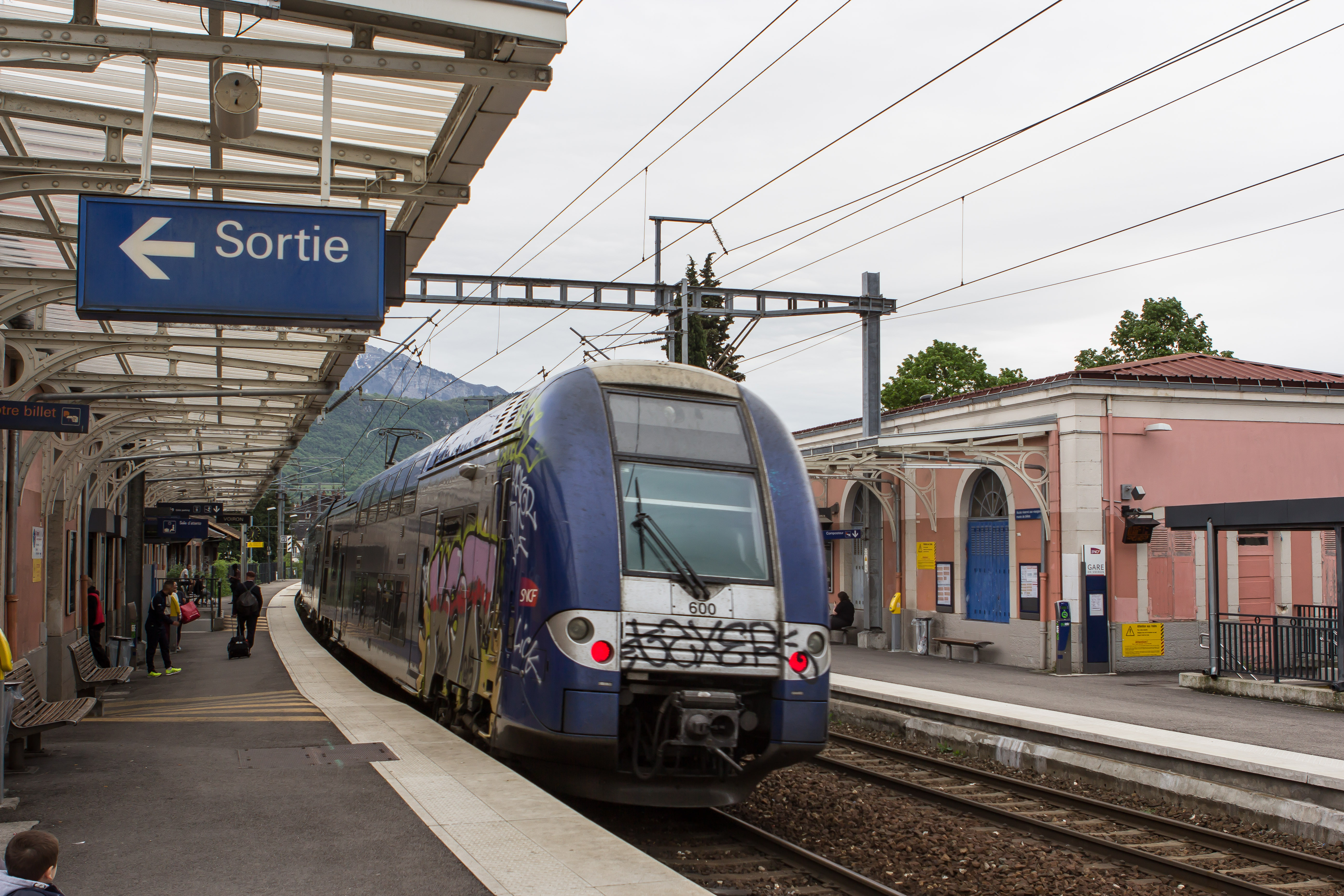 Gare de Voiron / Voiron / Savoie/ France